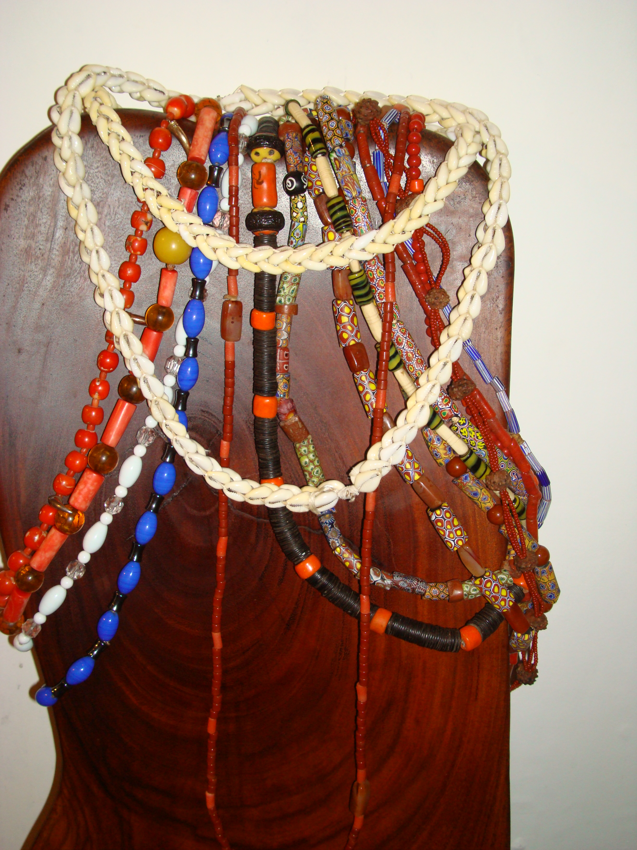 Fios de conta do candomblé, Bahia, Brasil